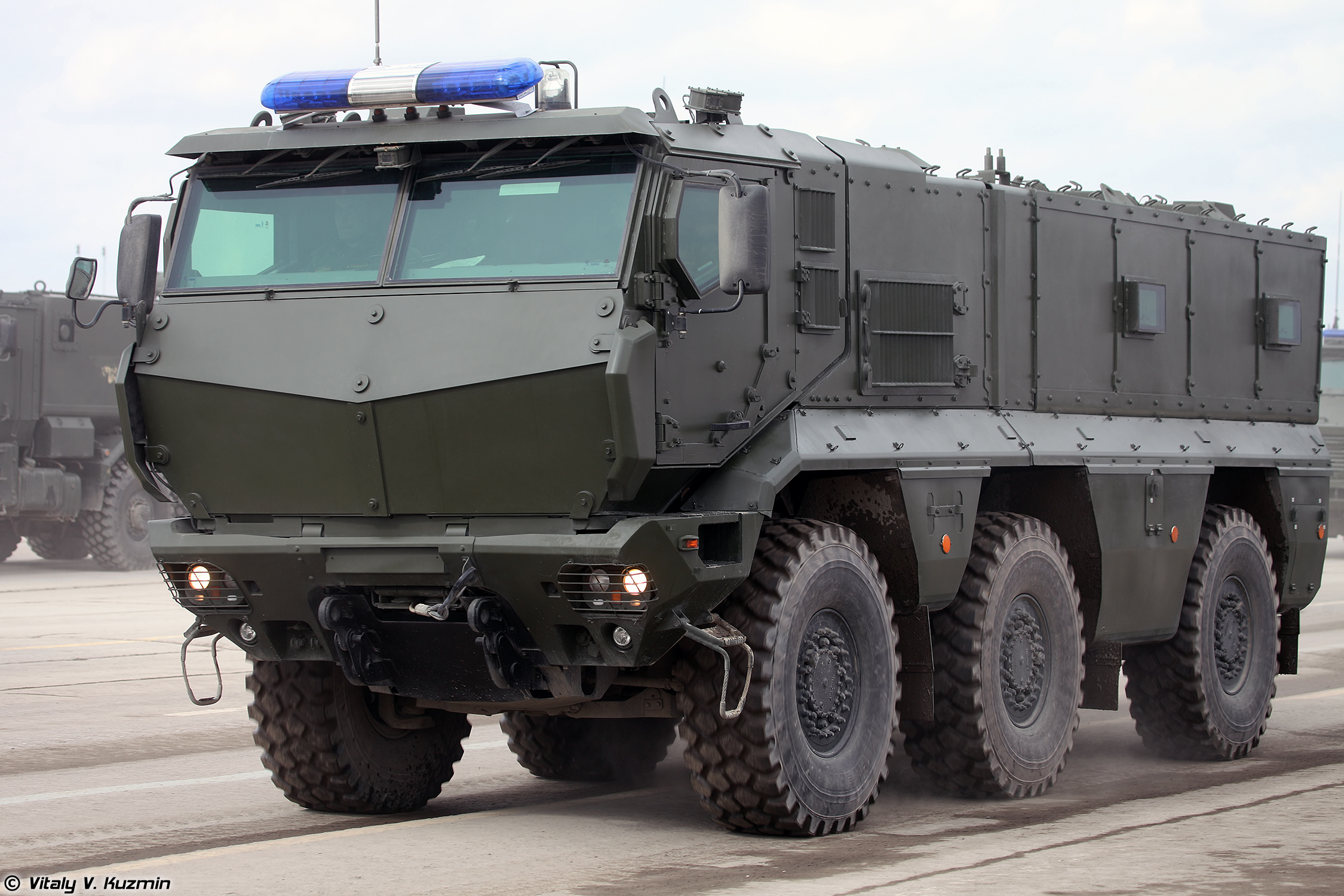 КАМАЗ-63968 Тайфун-К (KamAZ-63968 Typhoon-K)